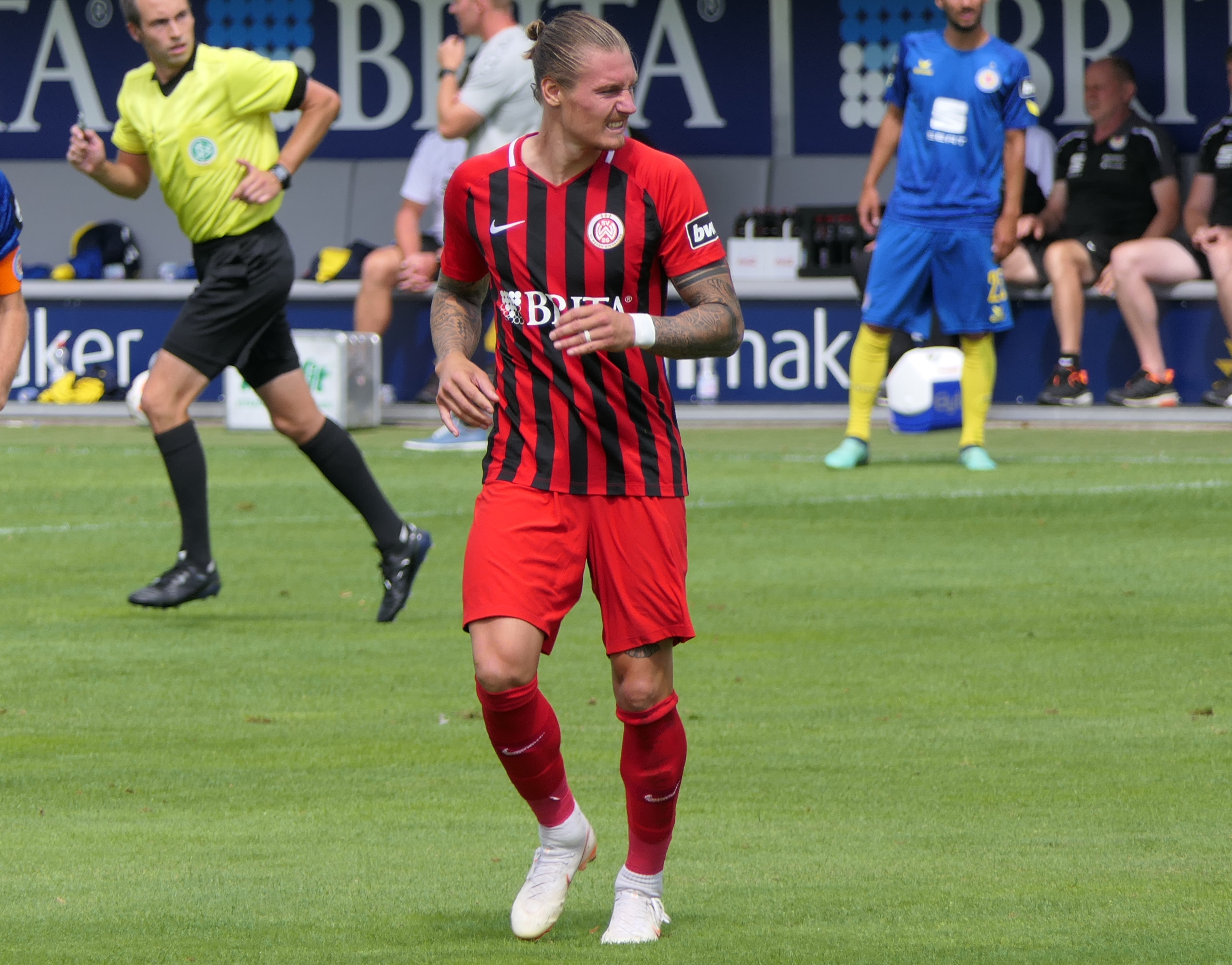 Der Fussballprofi Manuel Schäffler im Trikot von Wehen Wiesbaden beim Heimspiel gegen Eintracht Braunschweig am 11.08.2018.